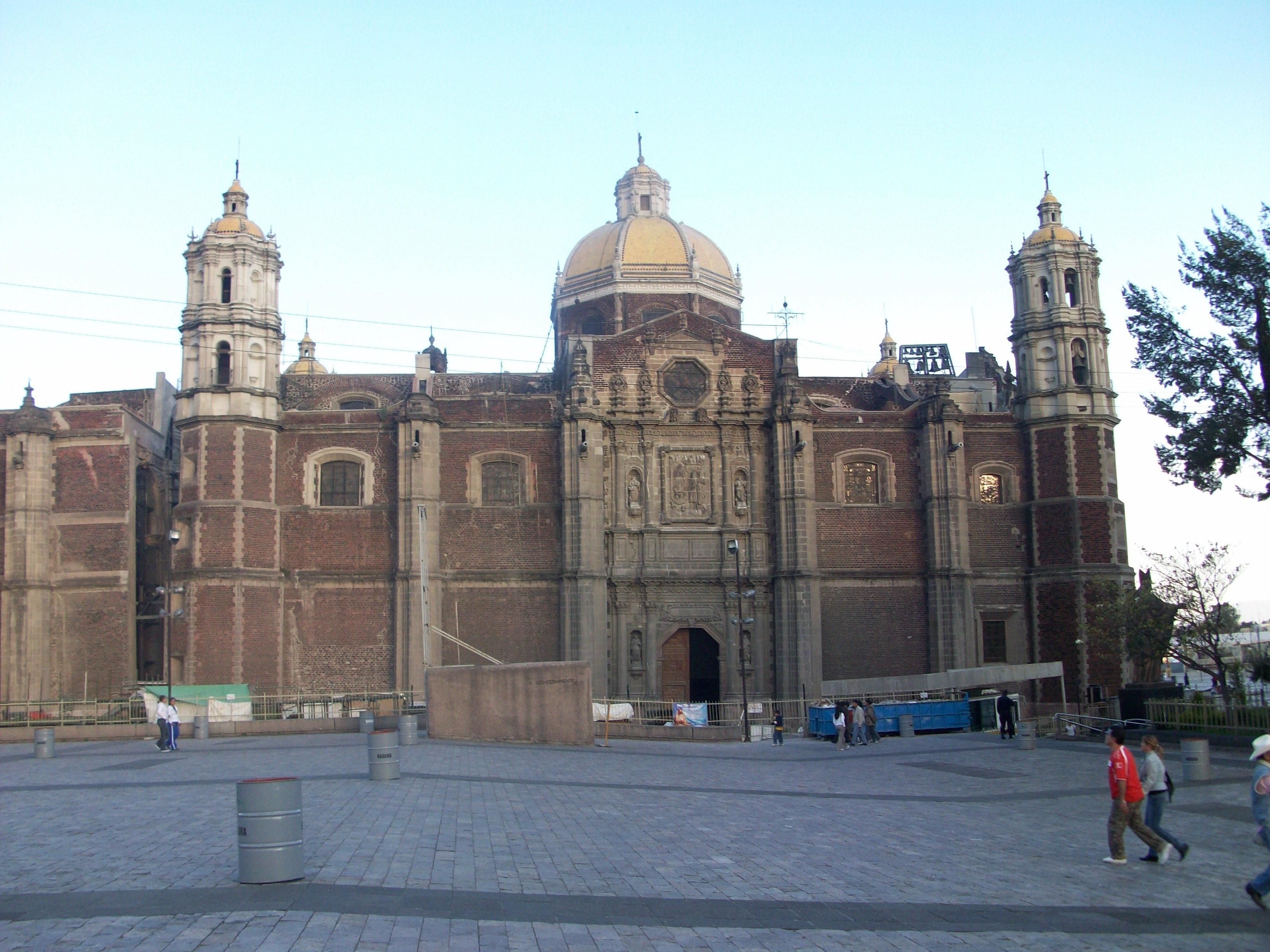 Conjunto Villa de Guadalupe